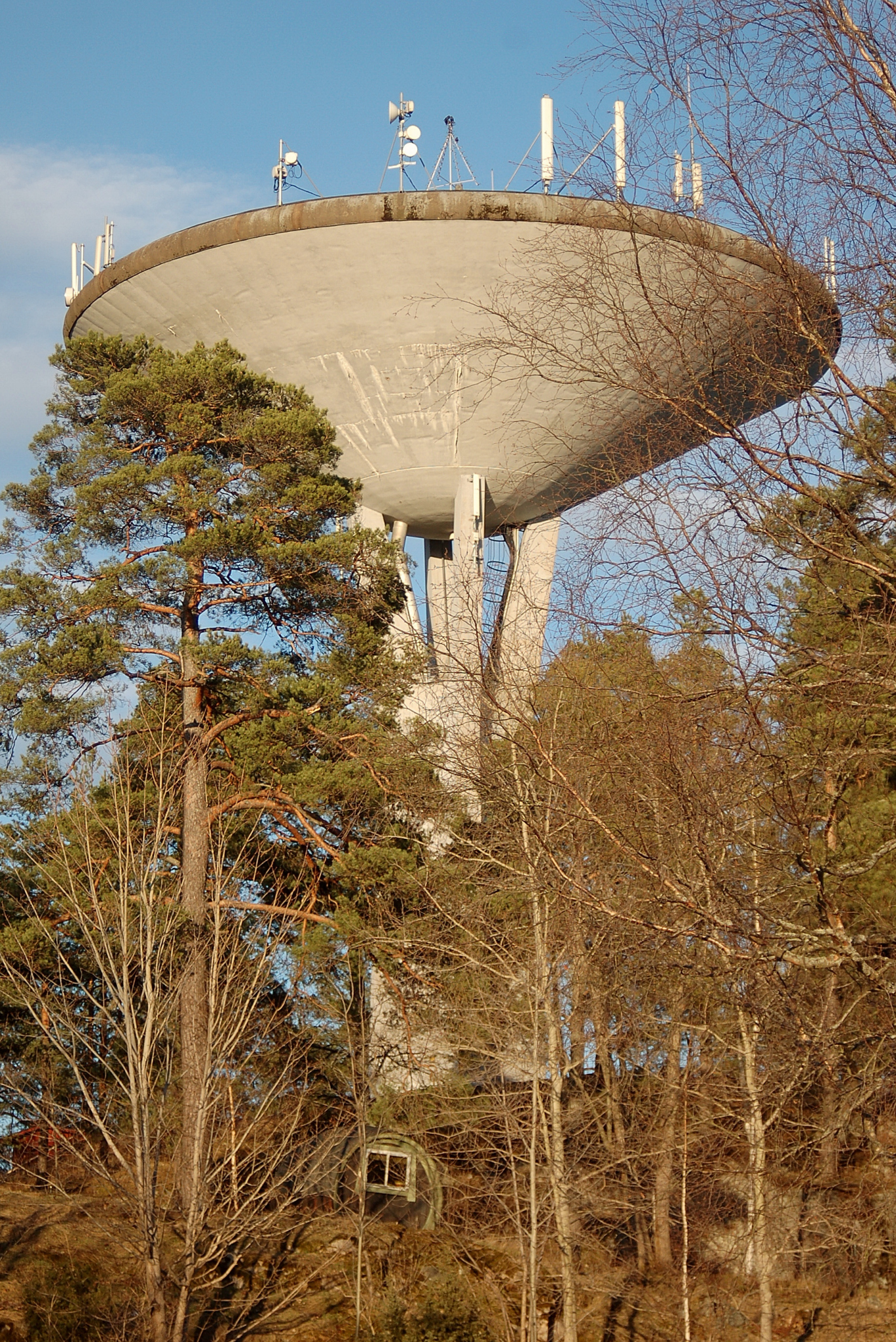 Vattentornet i Laxå. Water tower, Laxå Sweden